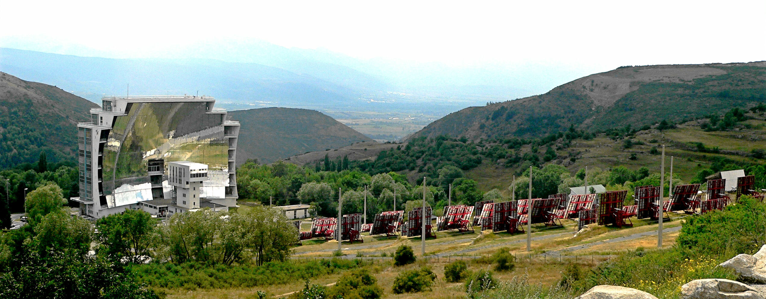 Four solaire Félix Trombe Solar power engine in Font Romeu France